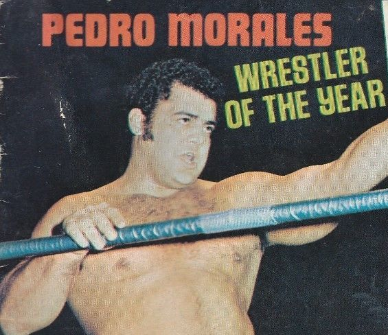 Pedro Morales en couverture du magazine de catch Wrestling Annual n.4 de 1973.